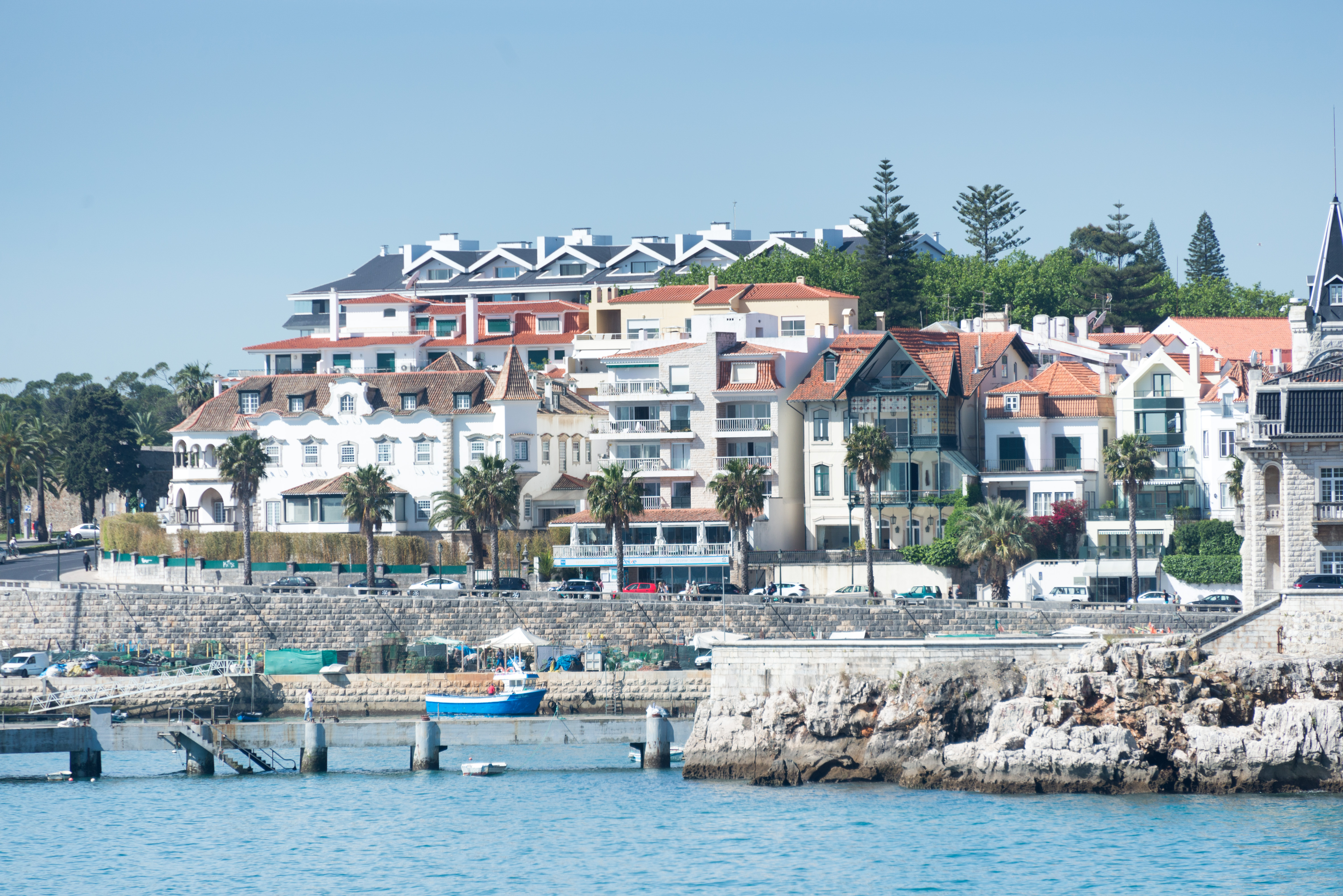 33037-Lisbon